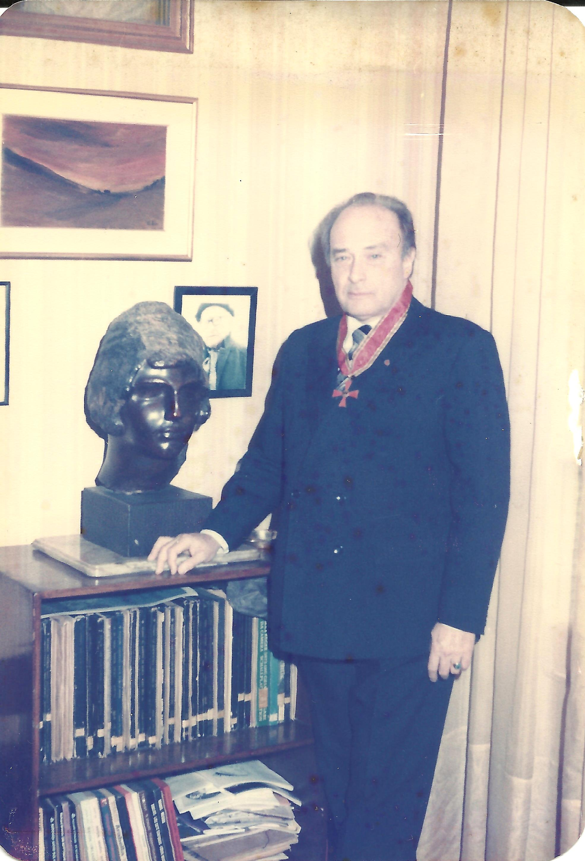 Retrato de Juan Pedro Franze en su casa de Chacabuco 409, Buenos Aires, República Argentina